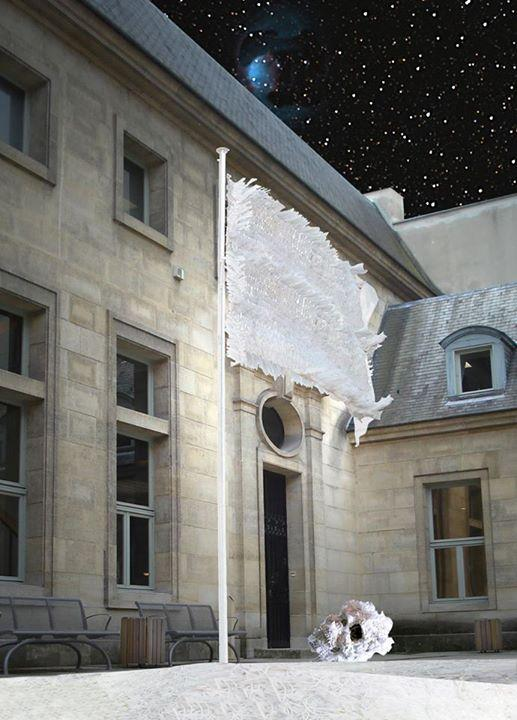 Sacs en plastique tressés